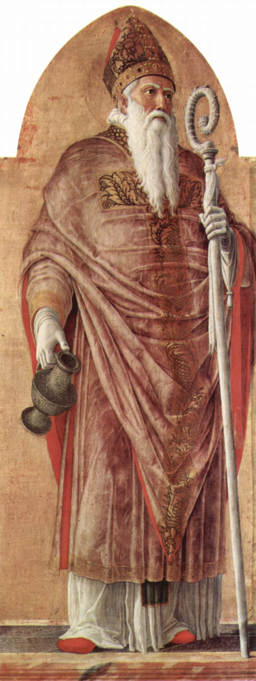 detail: St. Prosdozimus from Padua